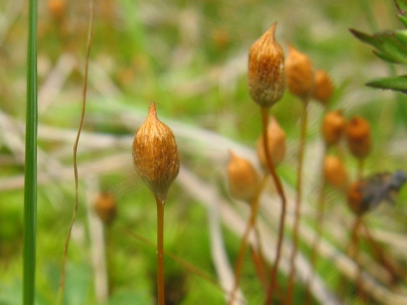 Steifblättriges Widertonmoos (Polytrichum strictum), Zingst, Sporogonen, Kapseln mit Kalyptra